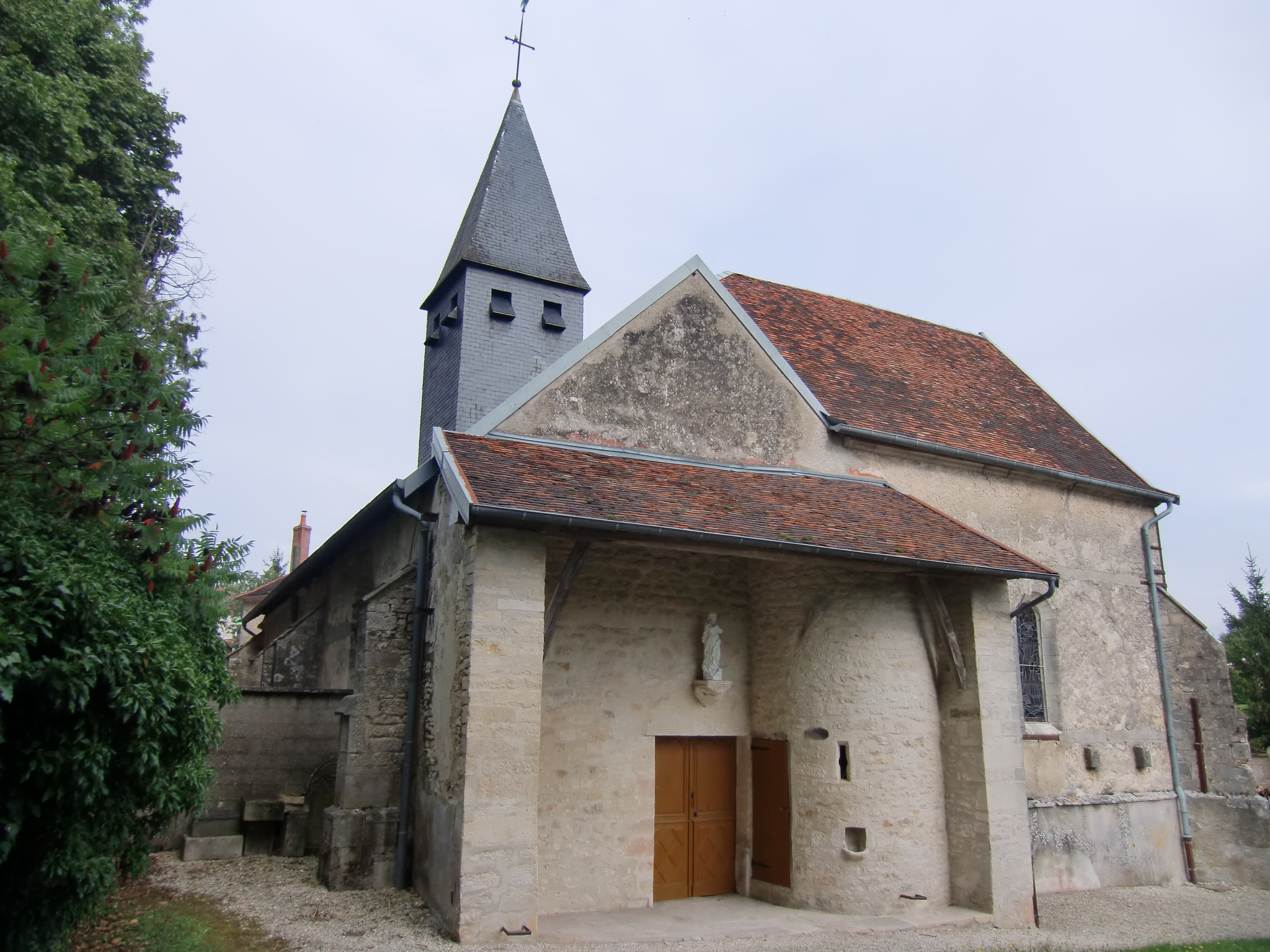 Eglise de l'Assomption de Notre-Dame de Bossancourt (Aube - France)